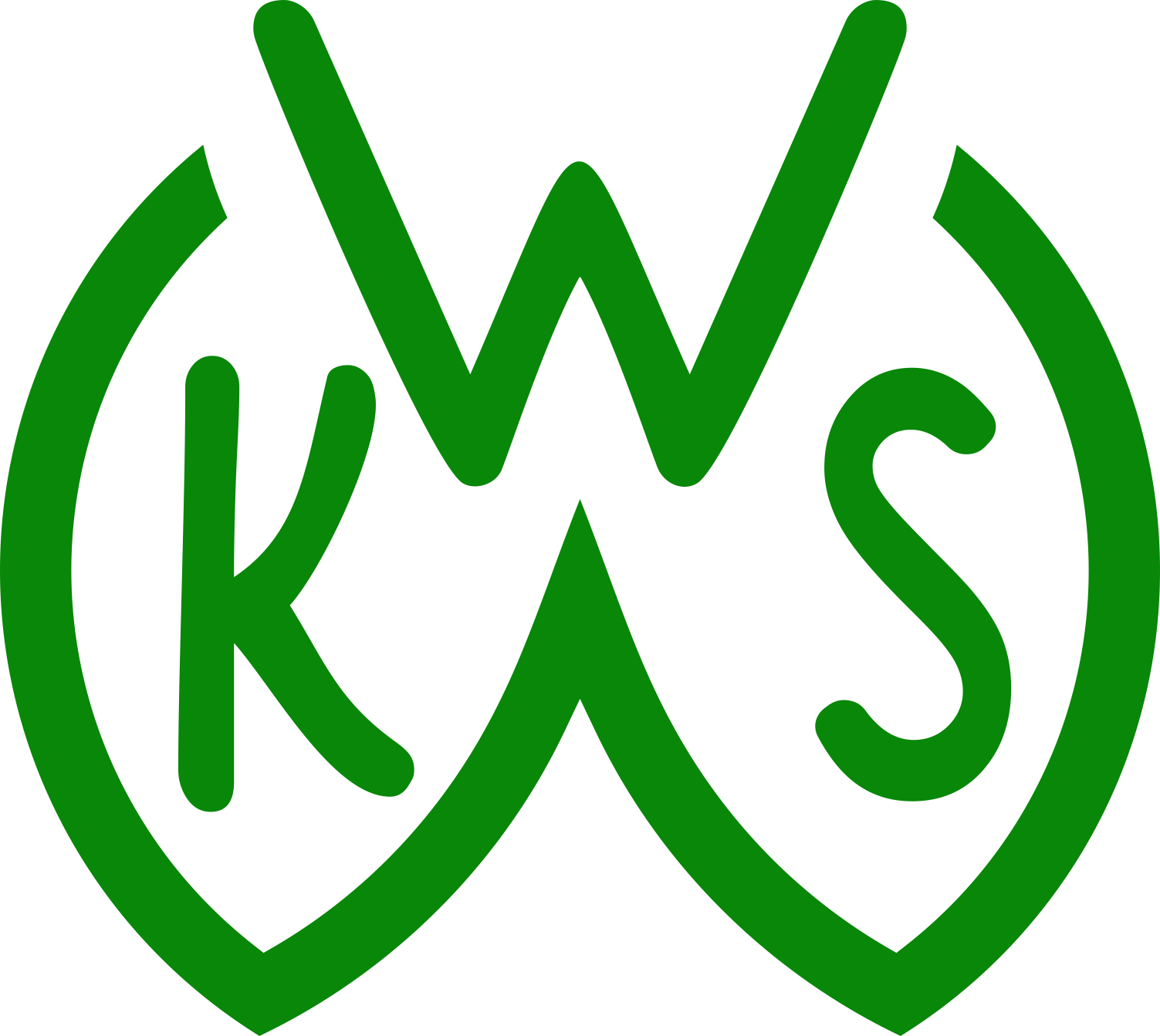 Logotyp Wojskowego Klubu Sportowego Wiarus, działającego w Krośnie Odrzańskim w latach 1957-1967. Praca własna odtworzona na podstawie archiwalnych dokumentów.